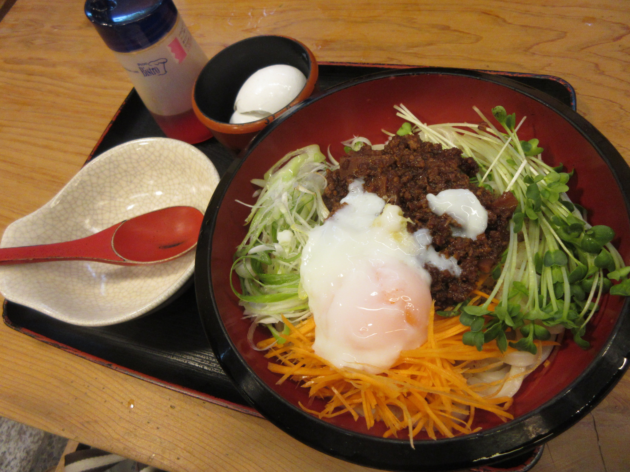 岡崎まぜめん。2012年8月、岡崎市の飲食店が共同で考案した。八丁味噌を使用。